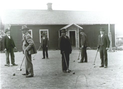 Croquet game in Klitten, Älvdalen, Sweden 1902